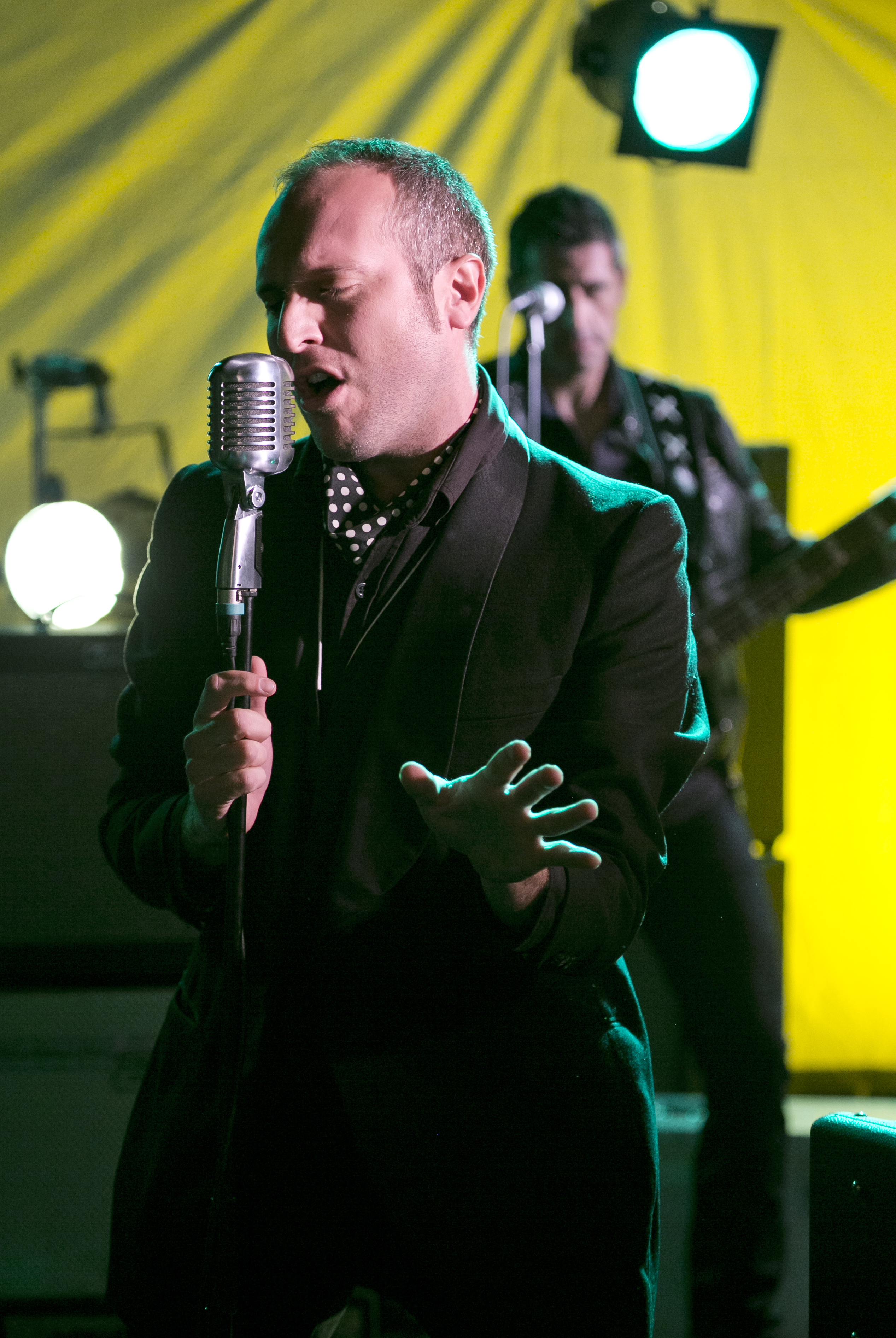 Rafa Caballero en el videoclip Protagonistas de Hoja de Ruta